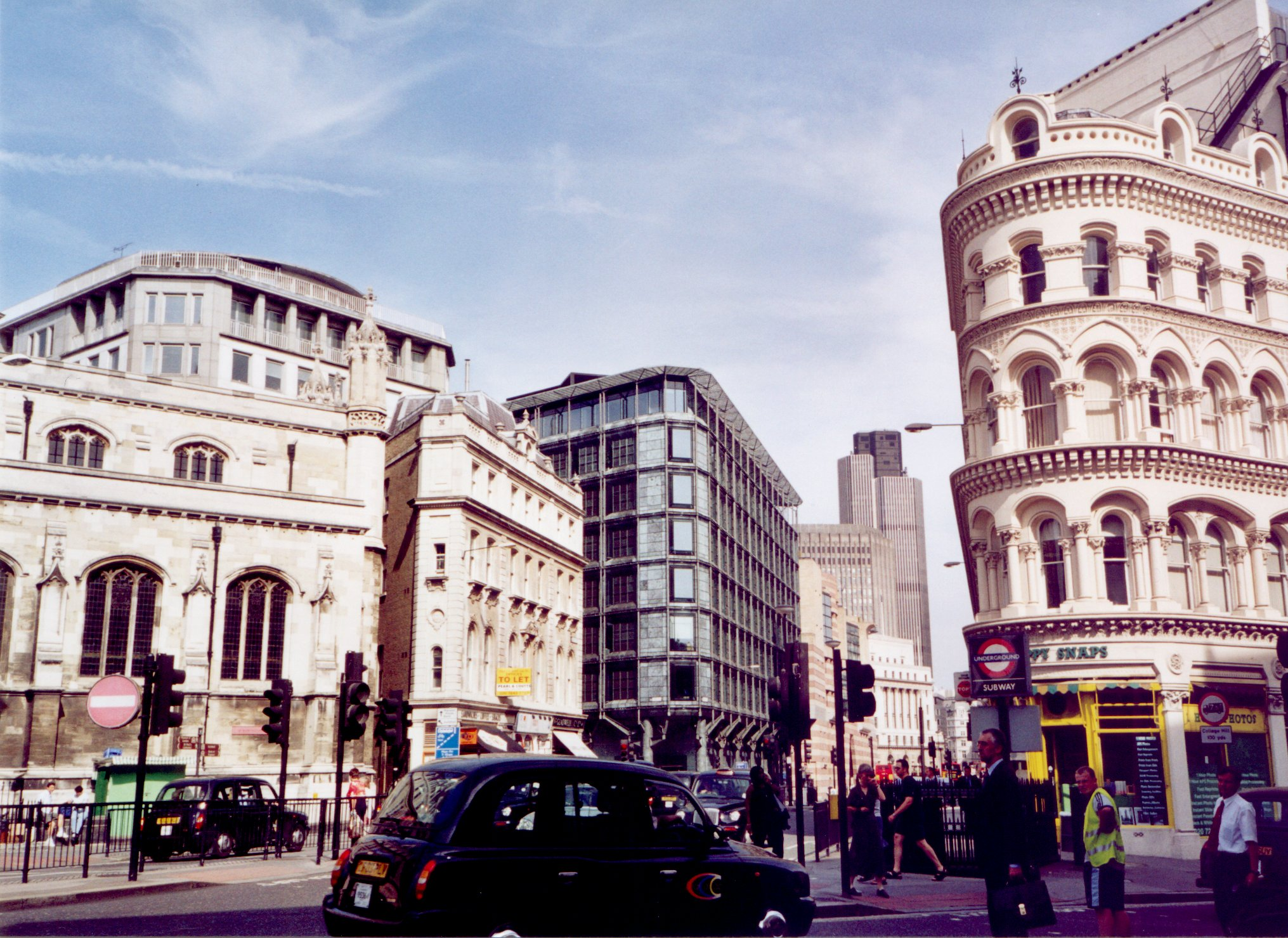 Straßenecke Cannon Street und Victoria Street in London Richtung Nordosten.